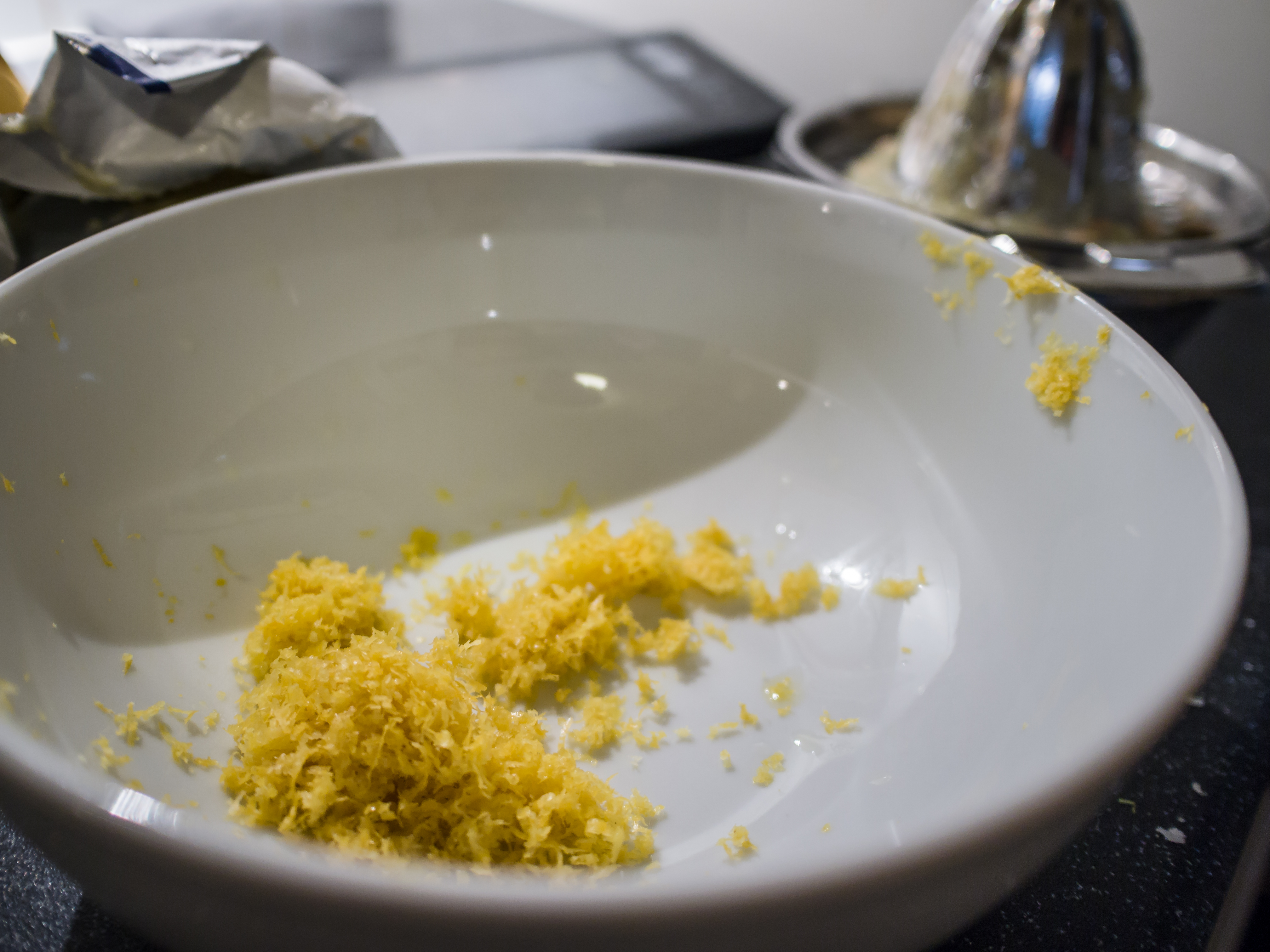 Lemon zest